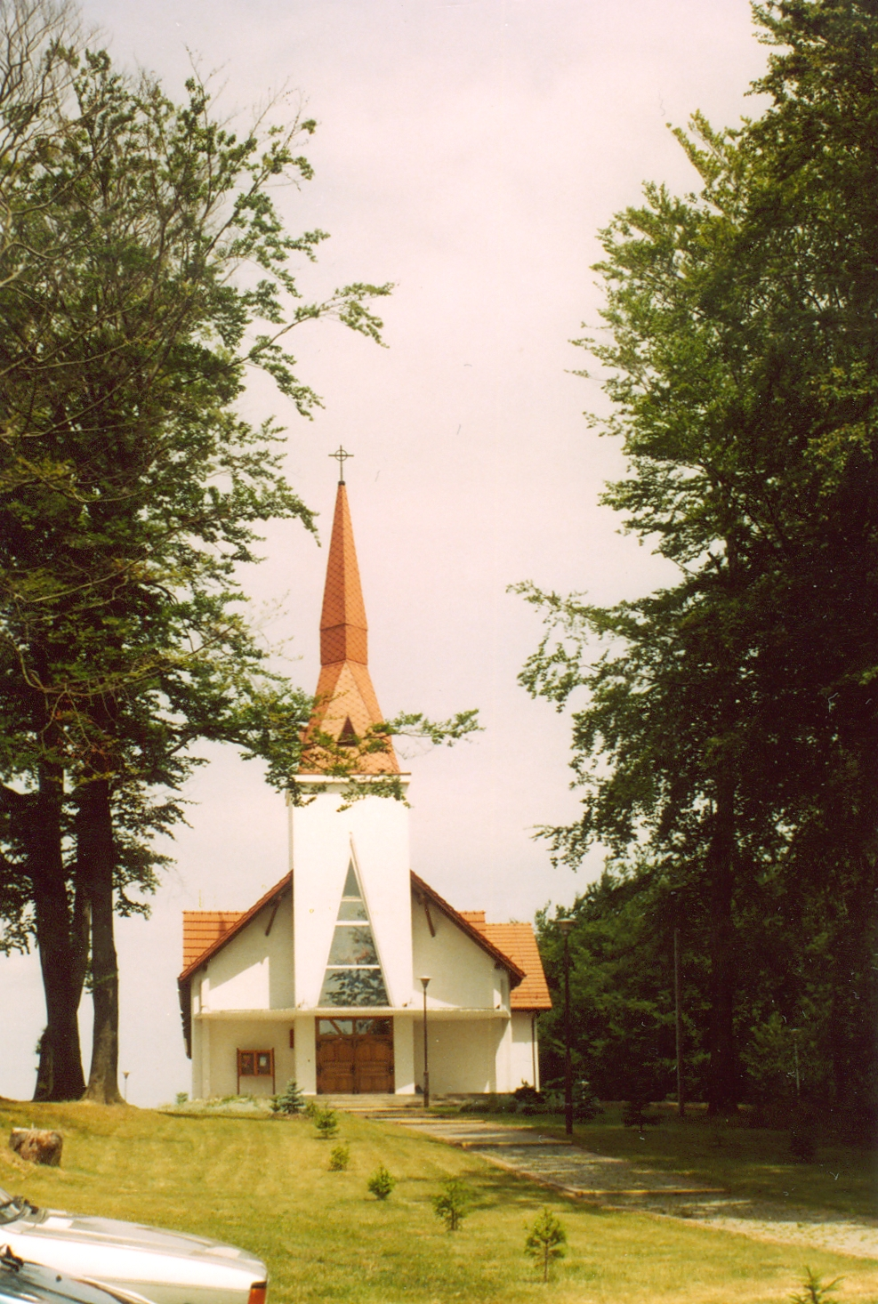 Włynkowo